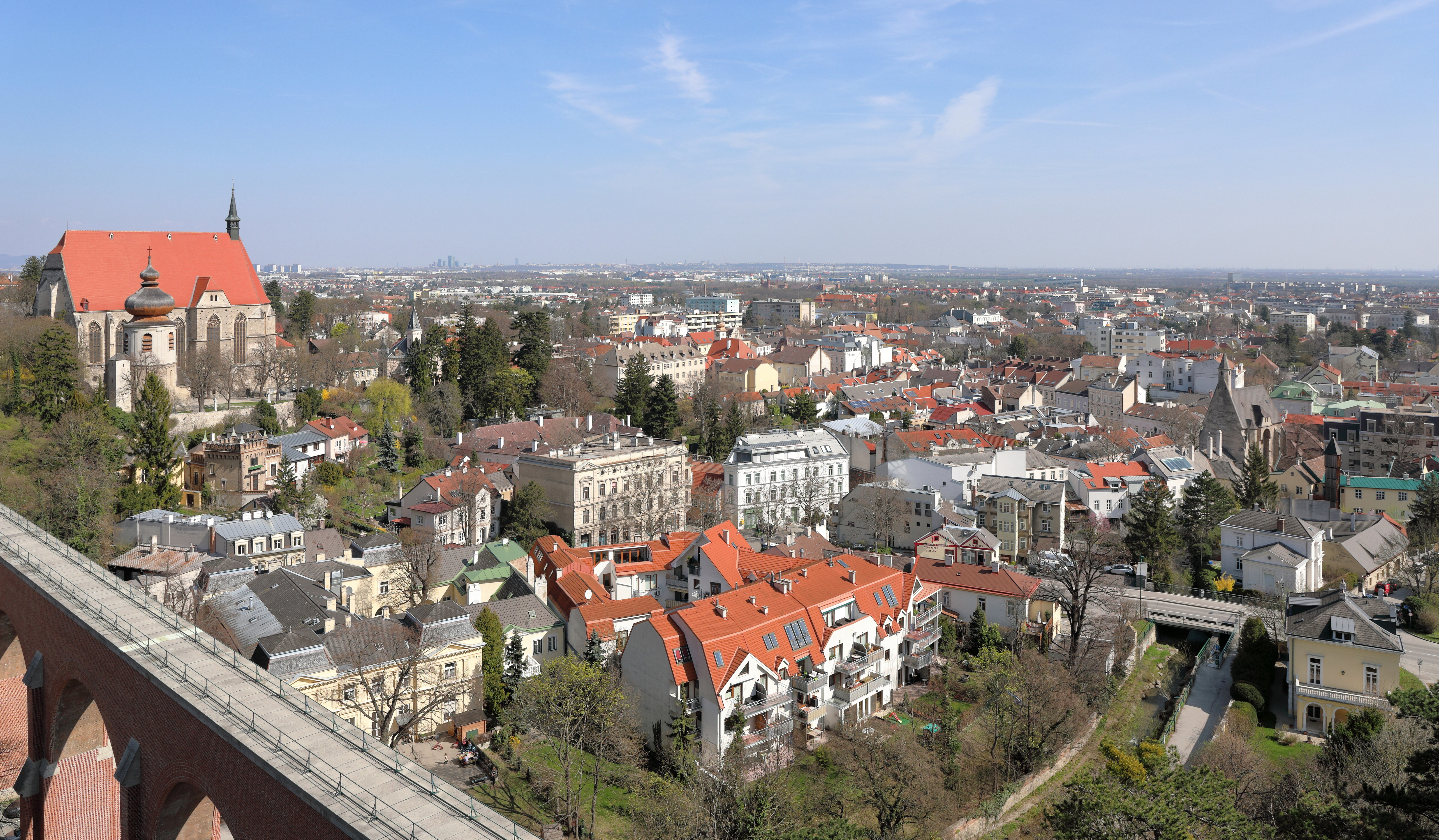 Blick von der Johannes-Ruhe über die niederösterreichische Bezirkshauptstadt Mödling in Richtung Nordost.Links unten das 186 Meter lange und zwischen 1870 und 1873 errichtete Aquädukt der I. Wiener Hochquellenleitung über den Mödlingbach. Linke Seite Bildmitte die gotische St.-Othmar-Kirche, davor der Karner hl. Pantaleon, ein spätromanischer Rundbau mit Halbkreisapsis aus dem 12./13. Jahrhundert und rechte Seite Bildmitte die Spitalskirche, ein spätgotischer Sakralbau.